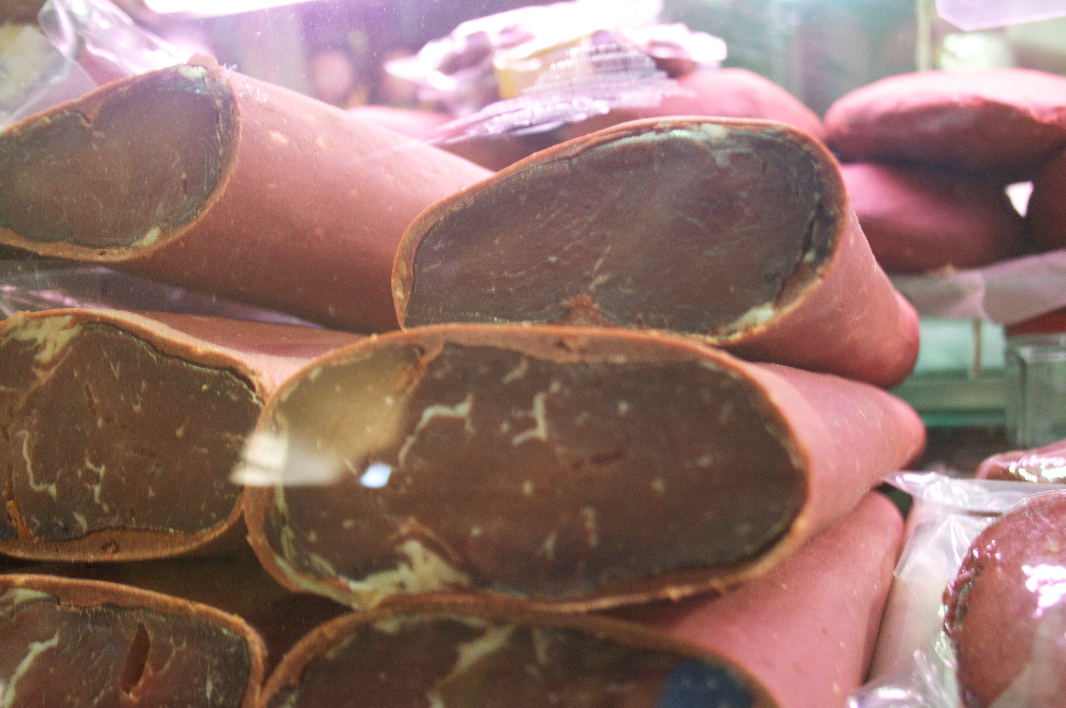 Mısır Çarşısı'nda satılan bir pastırma